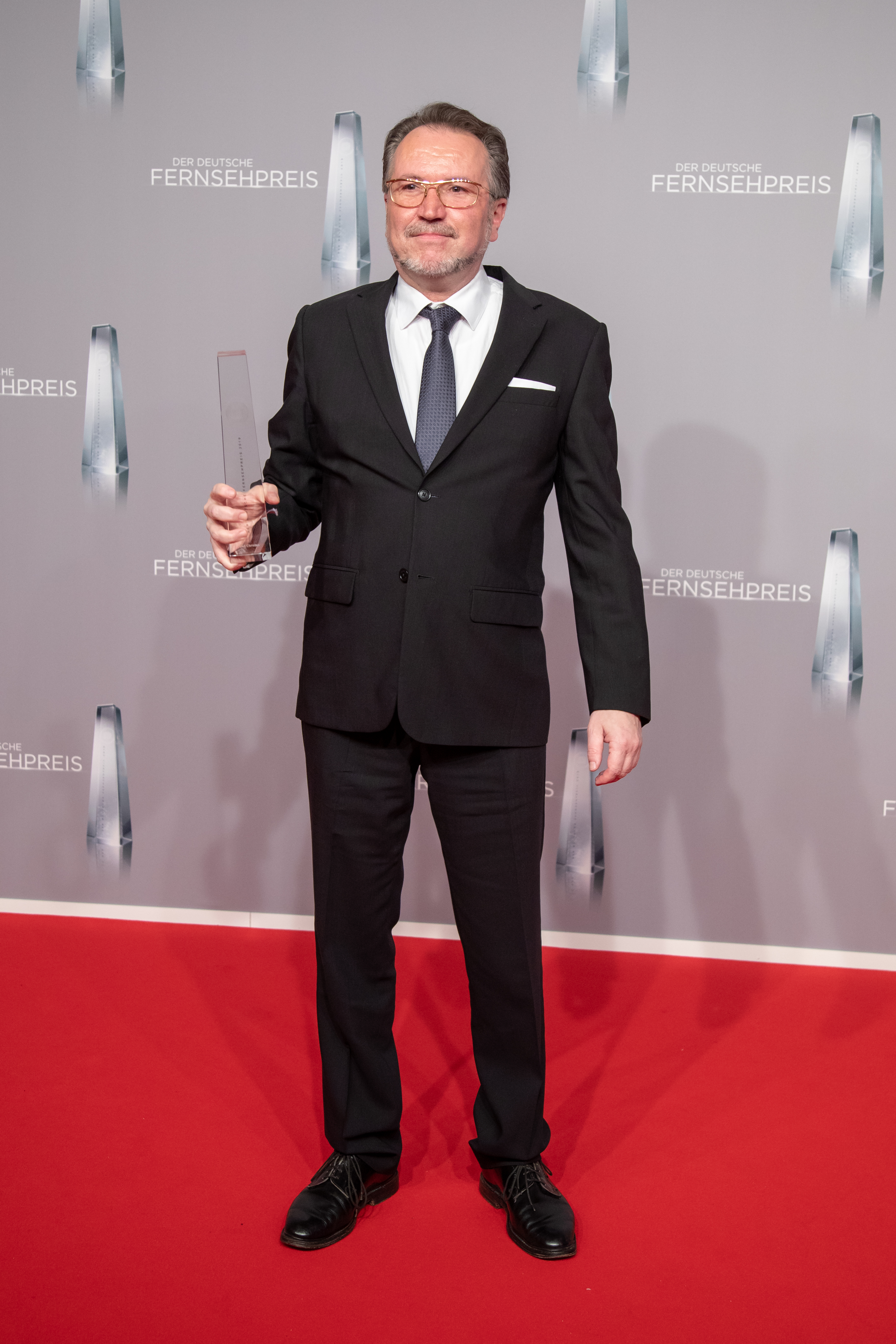 Ueli Christen (Bester Schnitt - Gladbeck) beim Deutschen Fernsehpreis 2019 in der Düsseldorfer Rheinterrasse